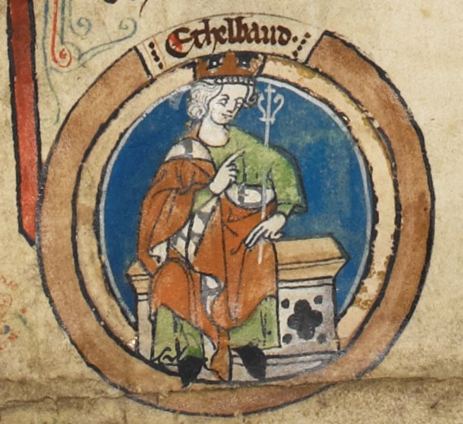 Miniature d'Æthelbald de Wessex dans une généalogie royale du XIVe siècle.